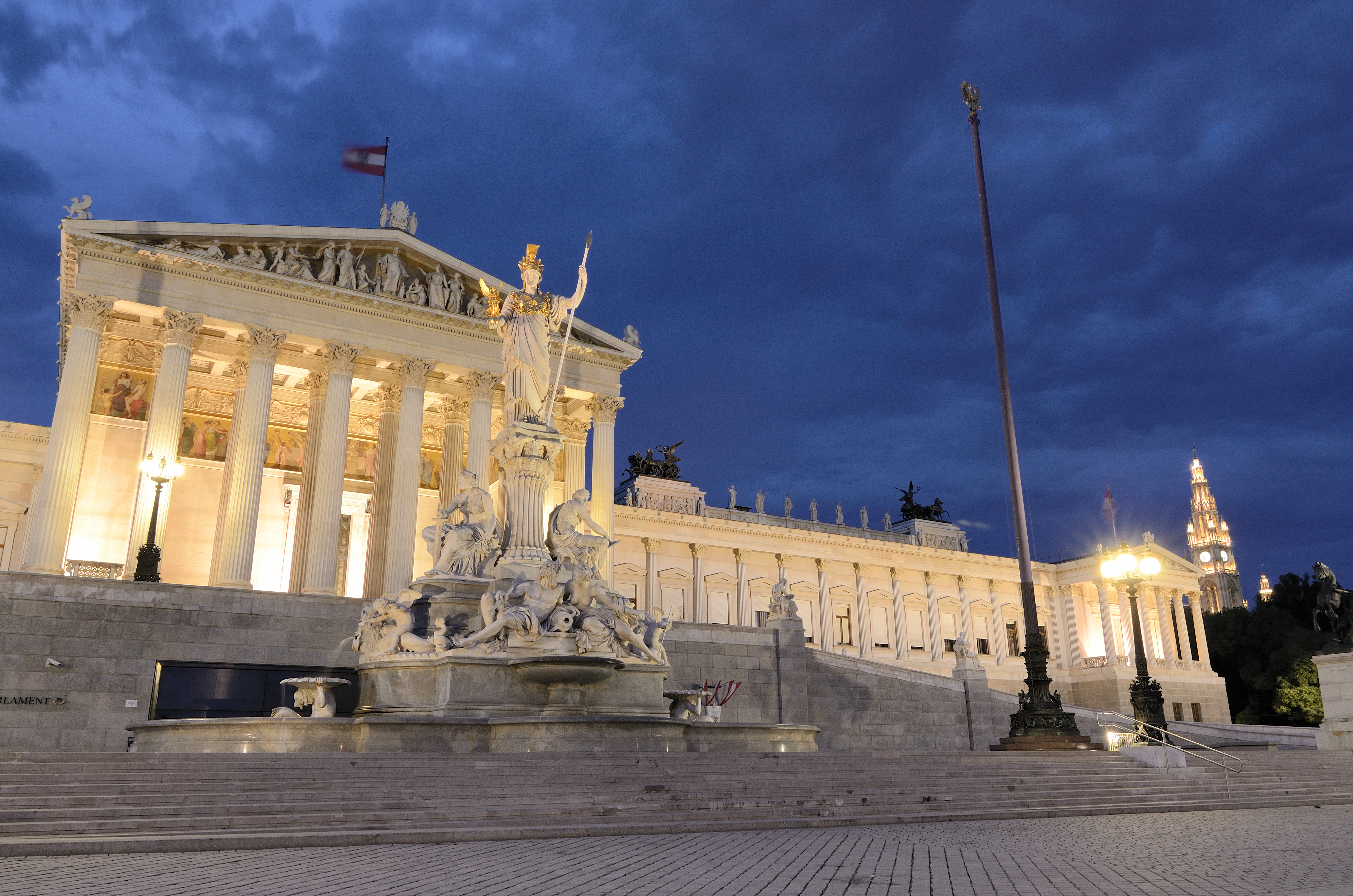 Parlamentsgebäude Wien mit Pallas Athene